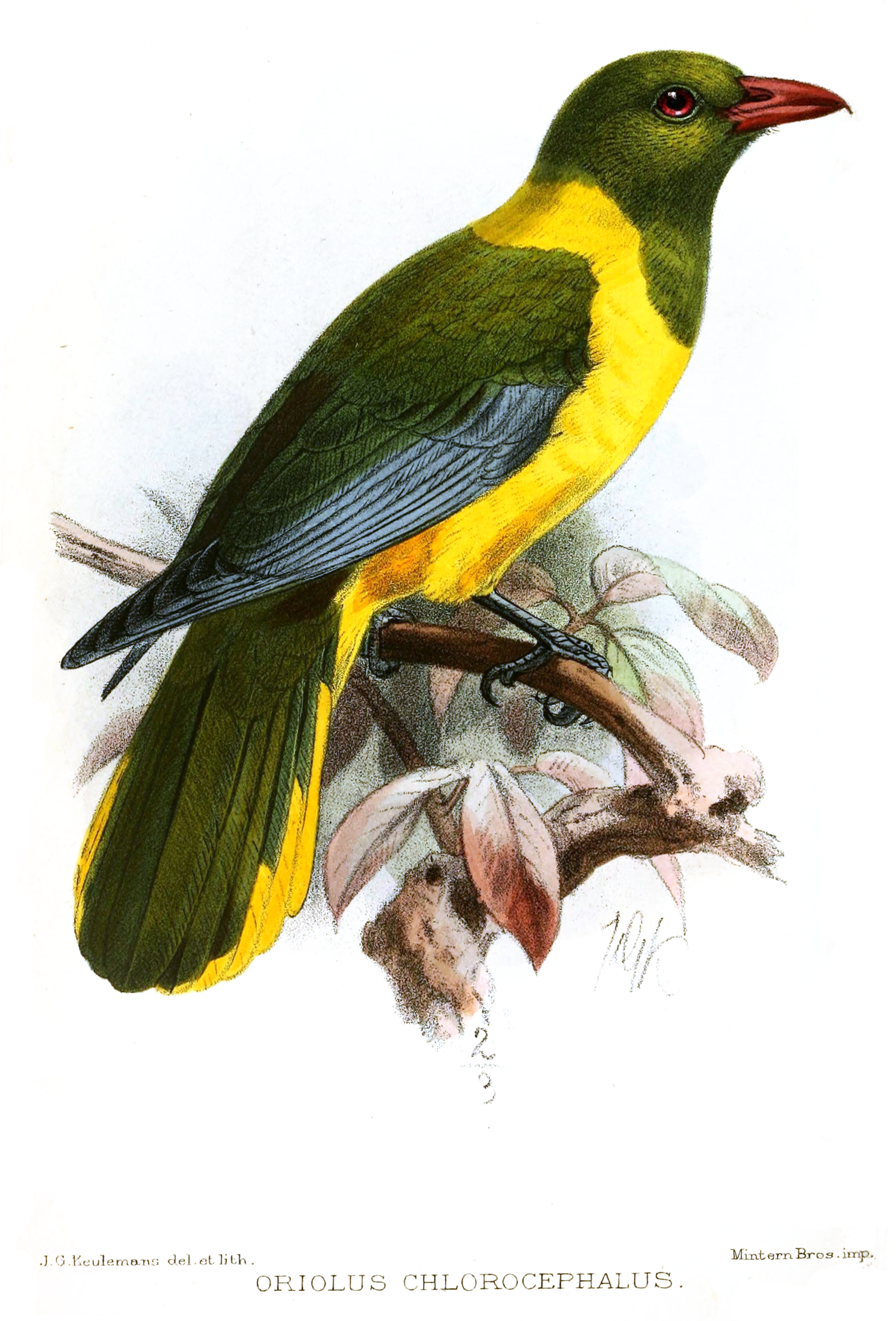 Oriolus chlorocephalus